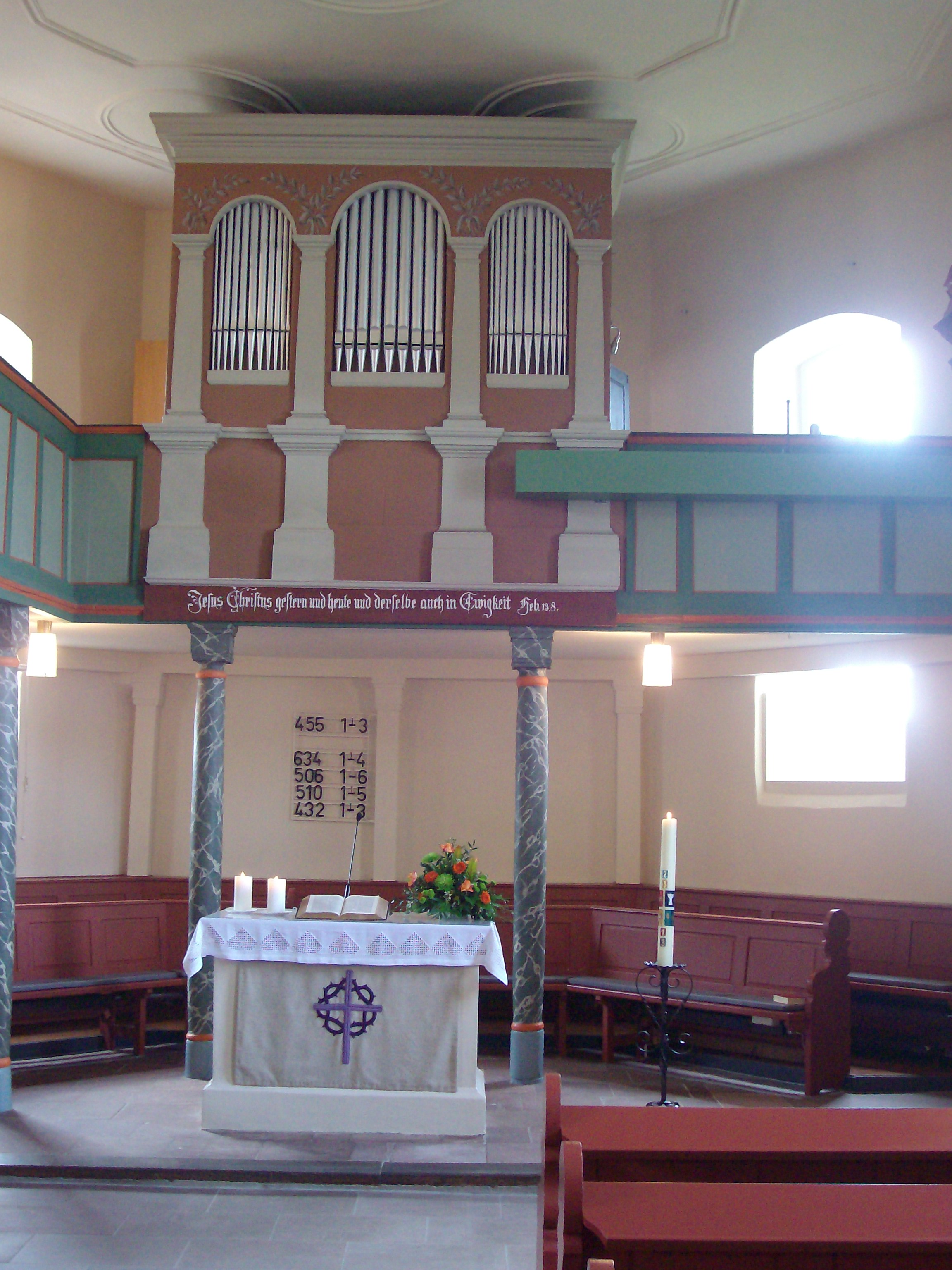 Orgelempore der Kirche in Dorf-Güll, Pohlheim, Hessen